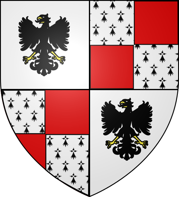 Blason d'origine du nom de MONTFALCON de Novalaise - Descendant du Noble Gaspard de MONTFALCON (XVème siècle)